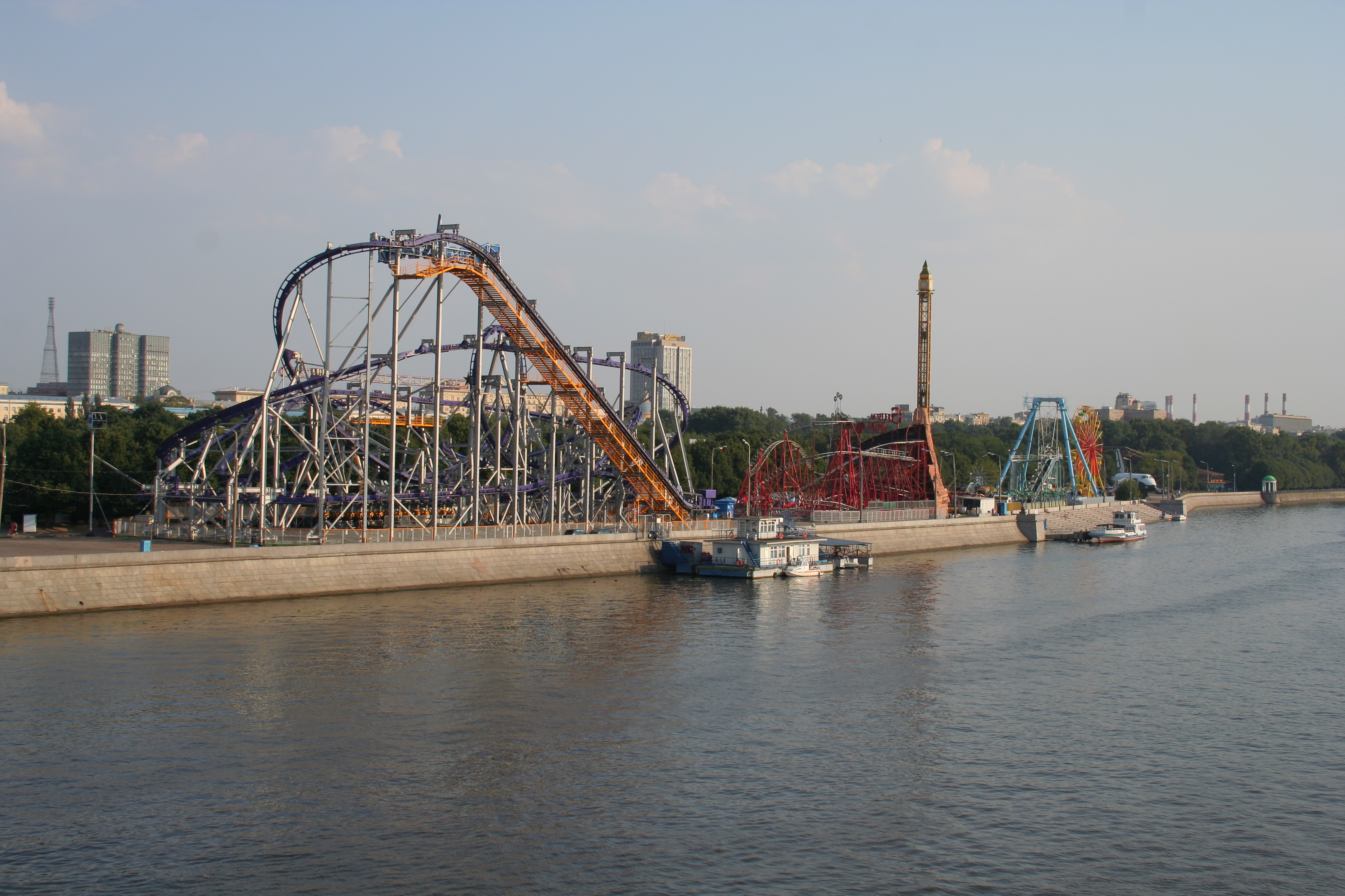 Der Gorki-Park in Moskau. Blick auf den Park von der Krim-Brücke.